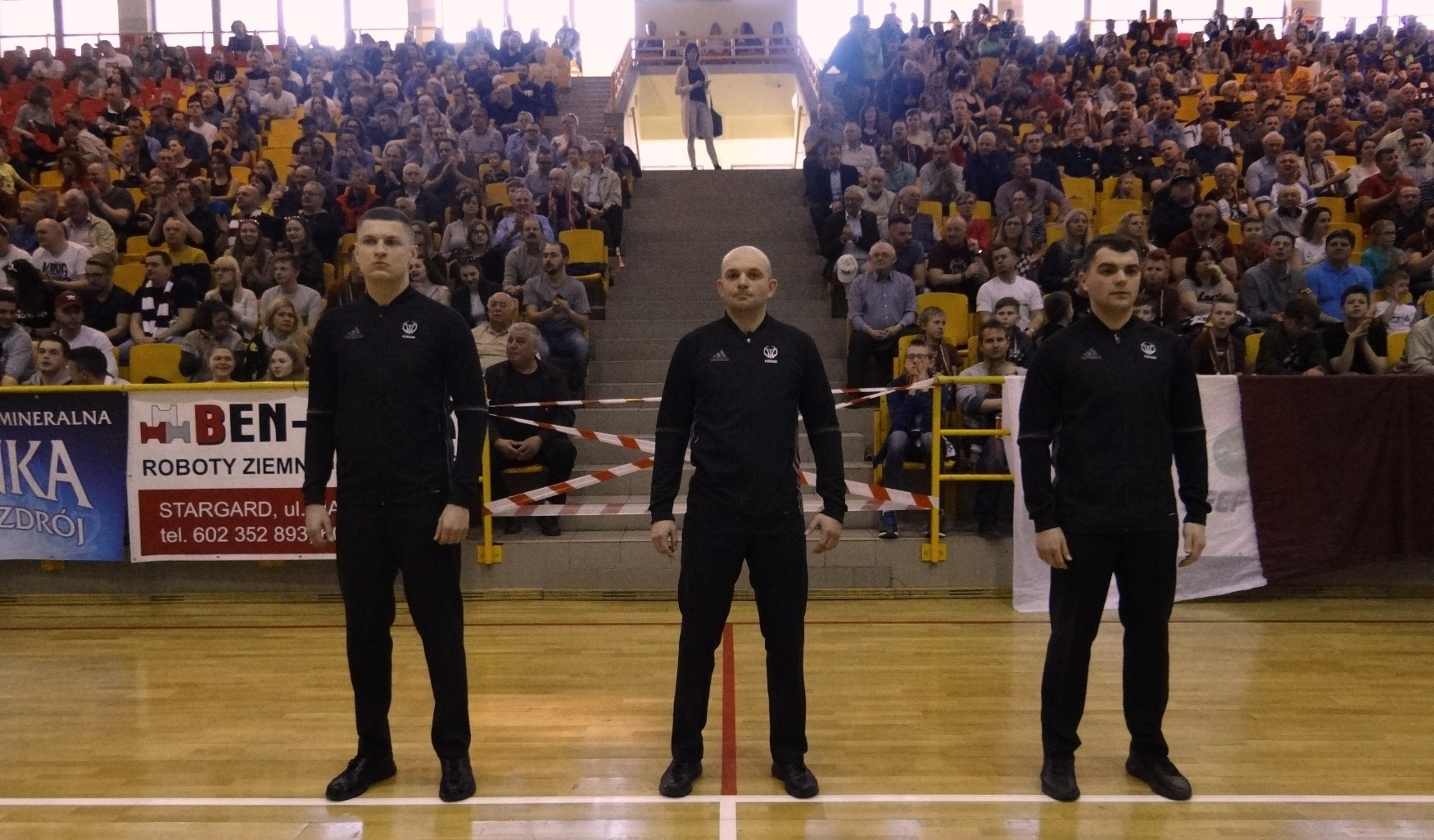 Sędziowie meczu Spójnia-Jamalex